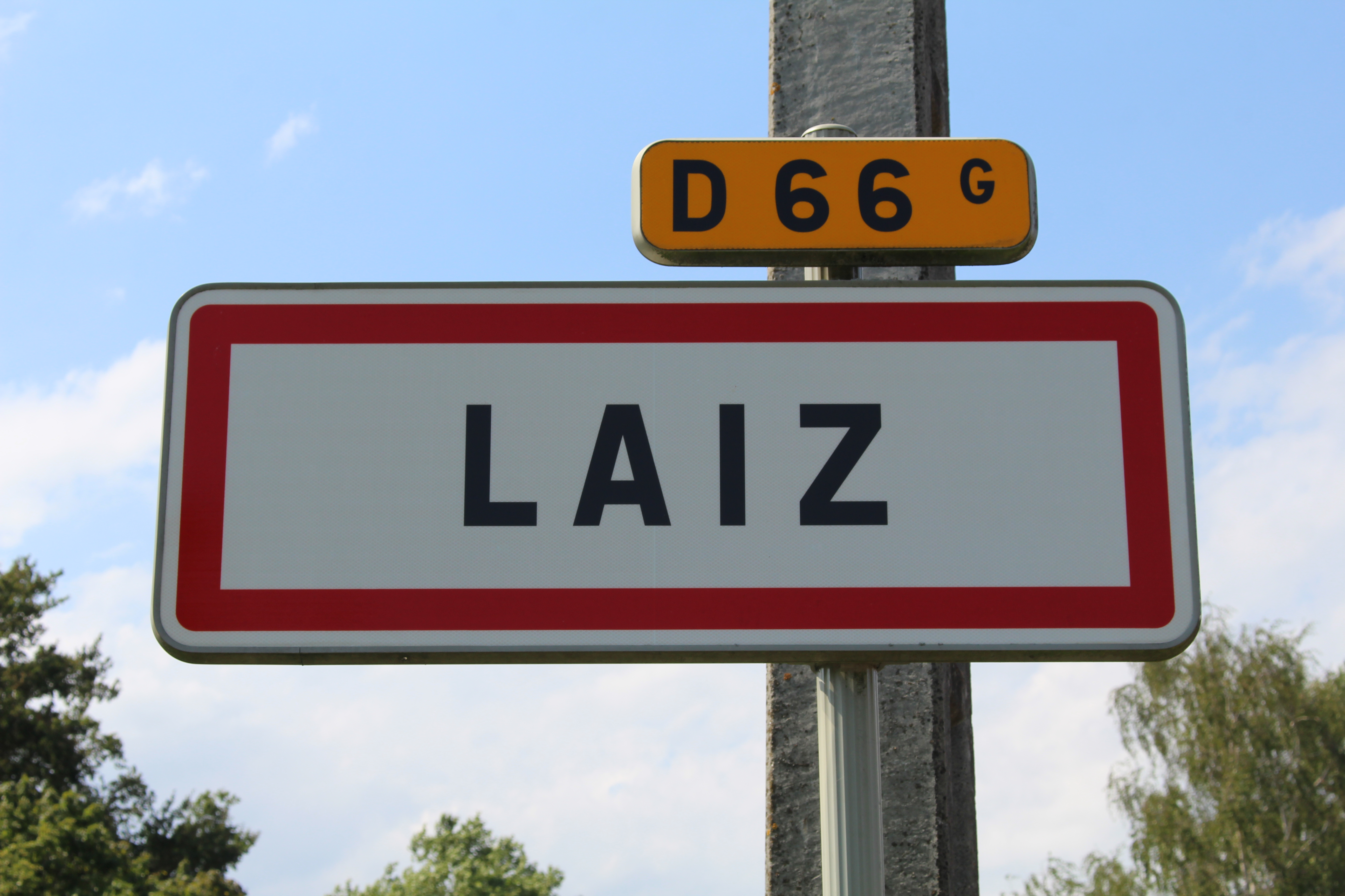 Panneau d'entrée dans Laiz.